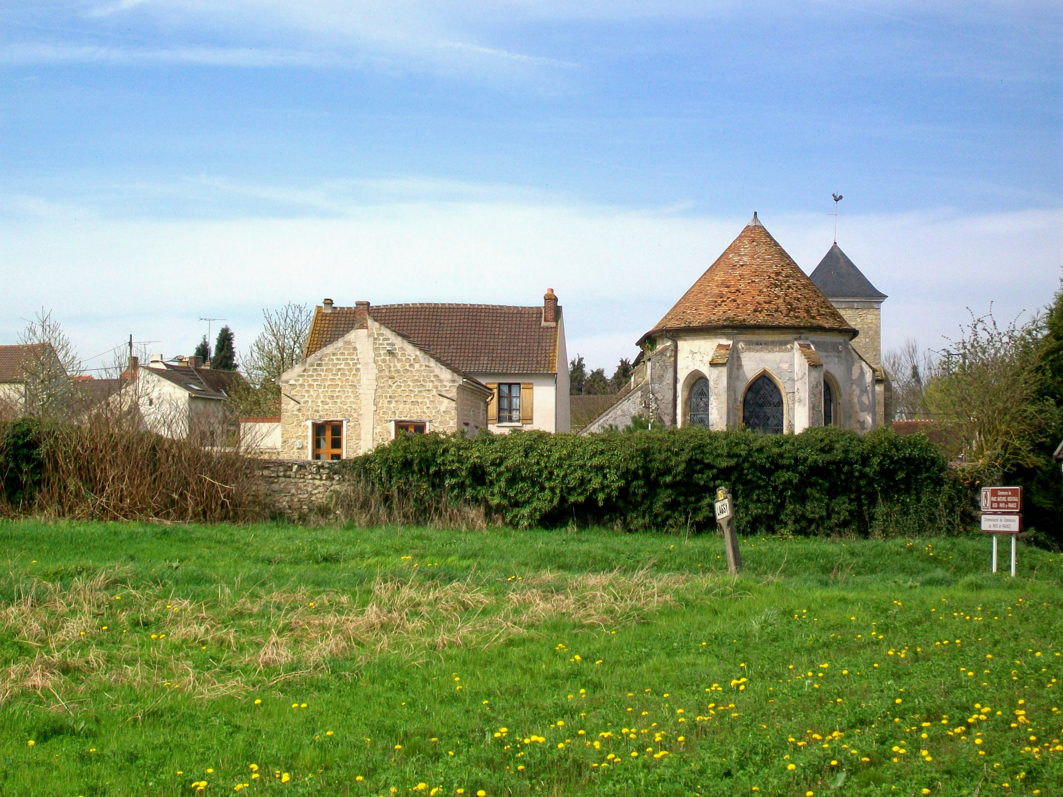 L'ancienne école (aujourd'hui salle des fêtes) et l'église de Lassy (95).